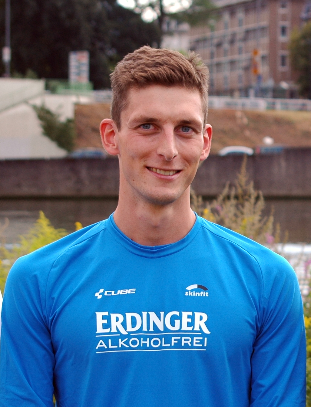 HeidelbergMan 2015: Florian Angert